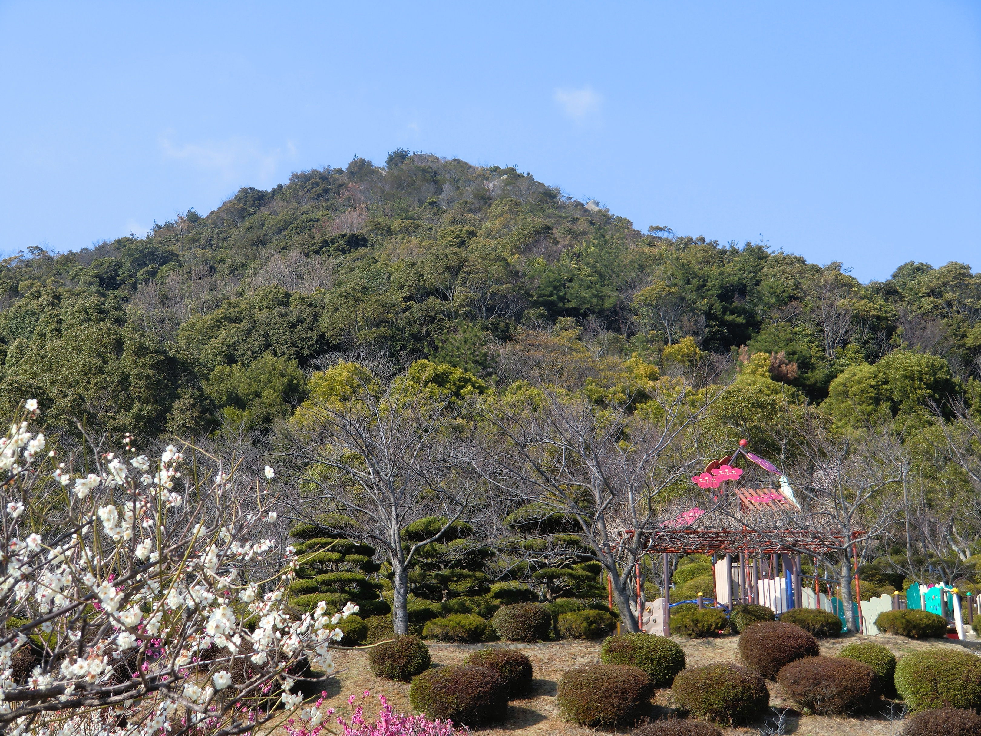 防府天満宮から見た天神山（手前は天神山公園）